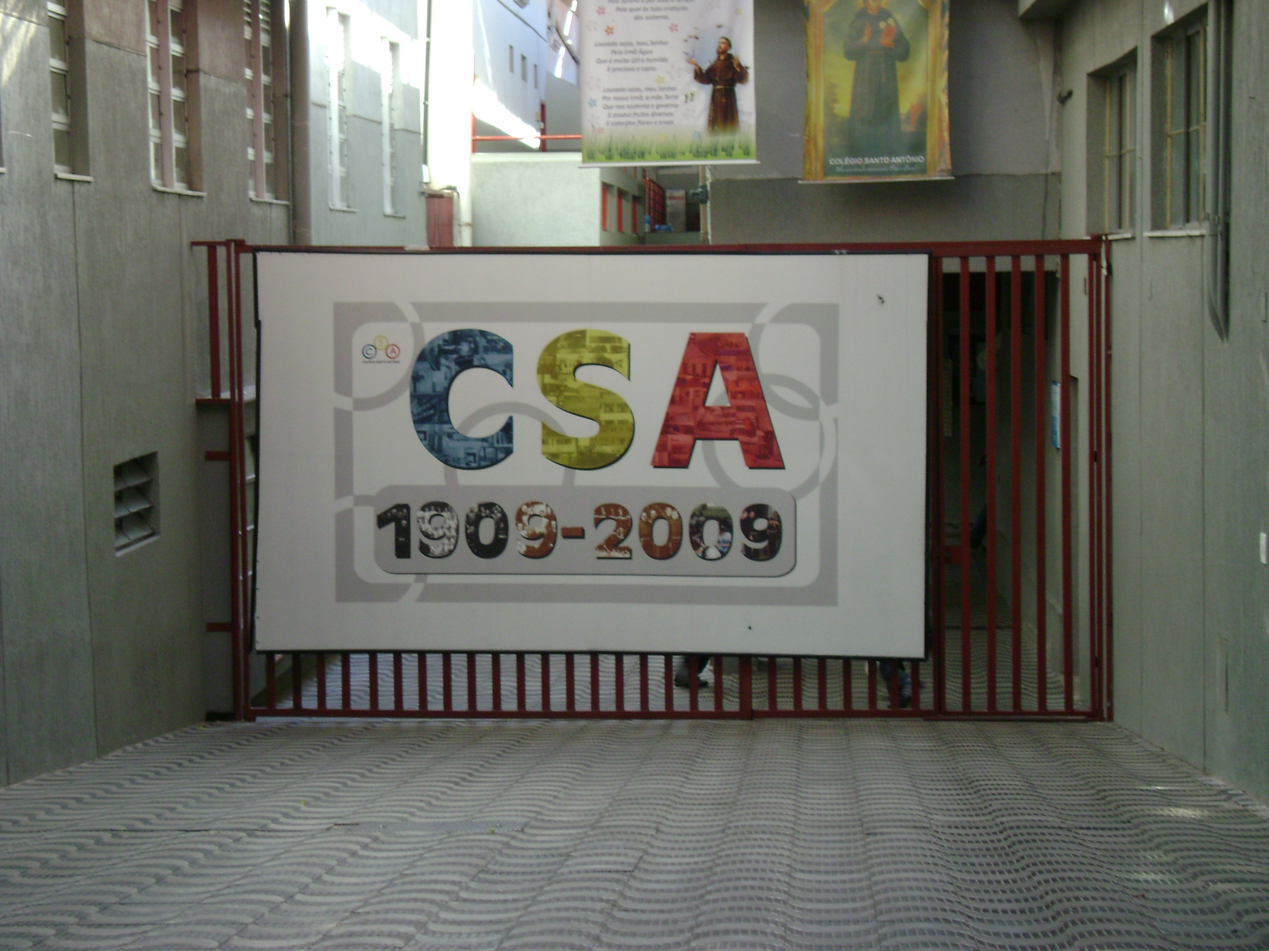 Entrada do Colégio Santo Antônio, com uma faixa da comemoração de centenário do estabelecimento.